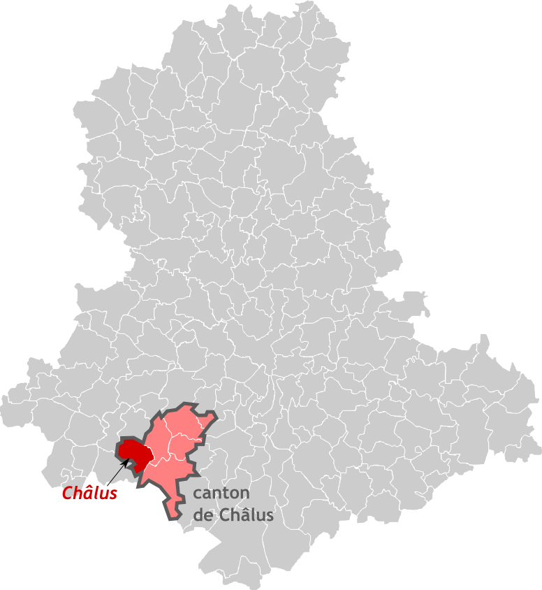 Carte de situation de la commune de Châlus sur une carte des communes de la Haute-Vienne